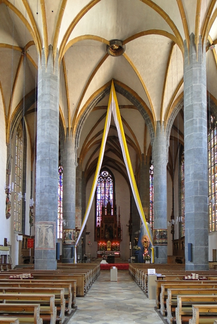 St. Johannes Neumarkt innen